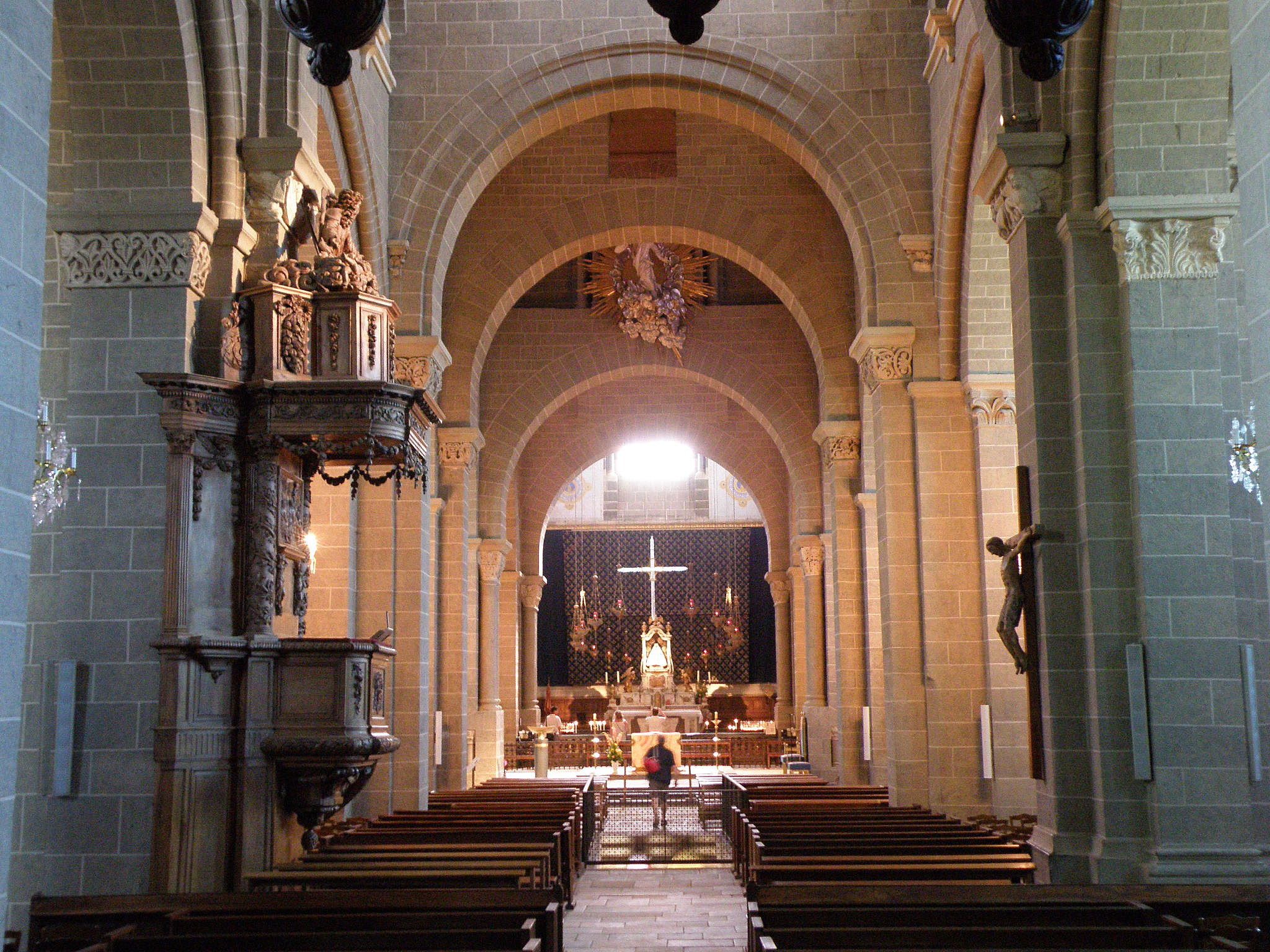 Le Puy-en-Velay (préf. de la Haute-Loire, France). Cathédrale Notre-Dame, nef (coup d'oeil vers l'est). Au fond, dans le choeur, maître-autel avec la Vierge Noire.